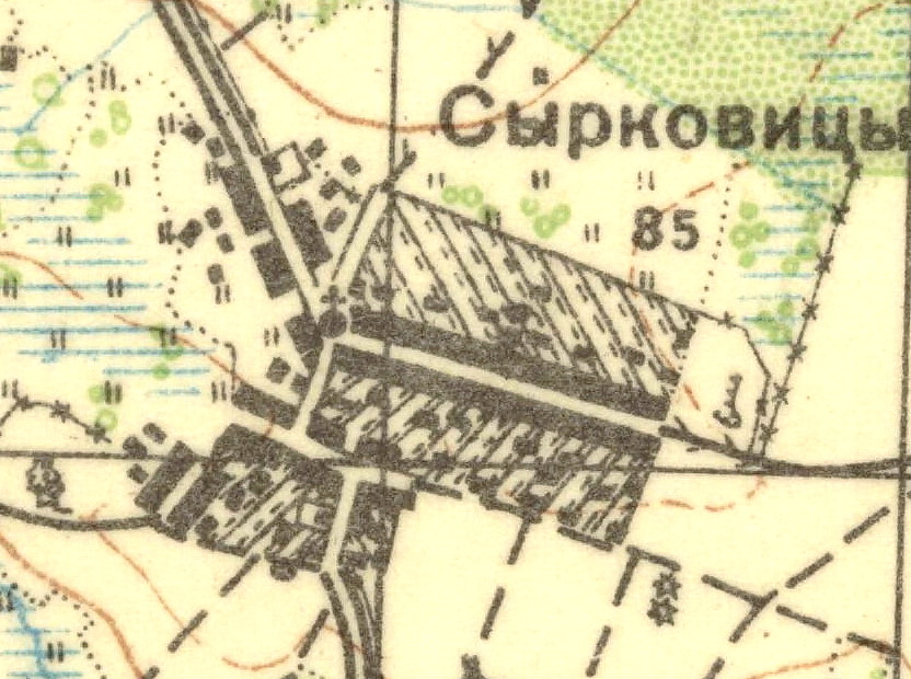 Топографическая карта Ленинградской области, квадрат О-35-23-В (Хотыницы), деревня Сырковицы